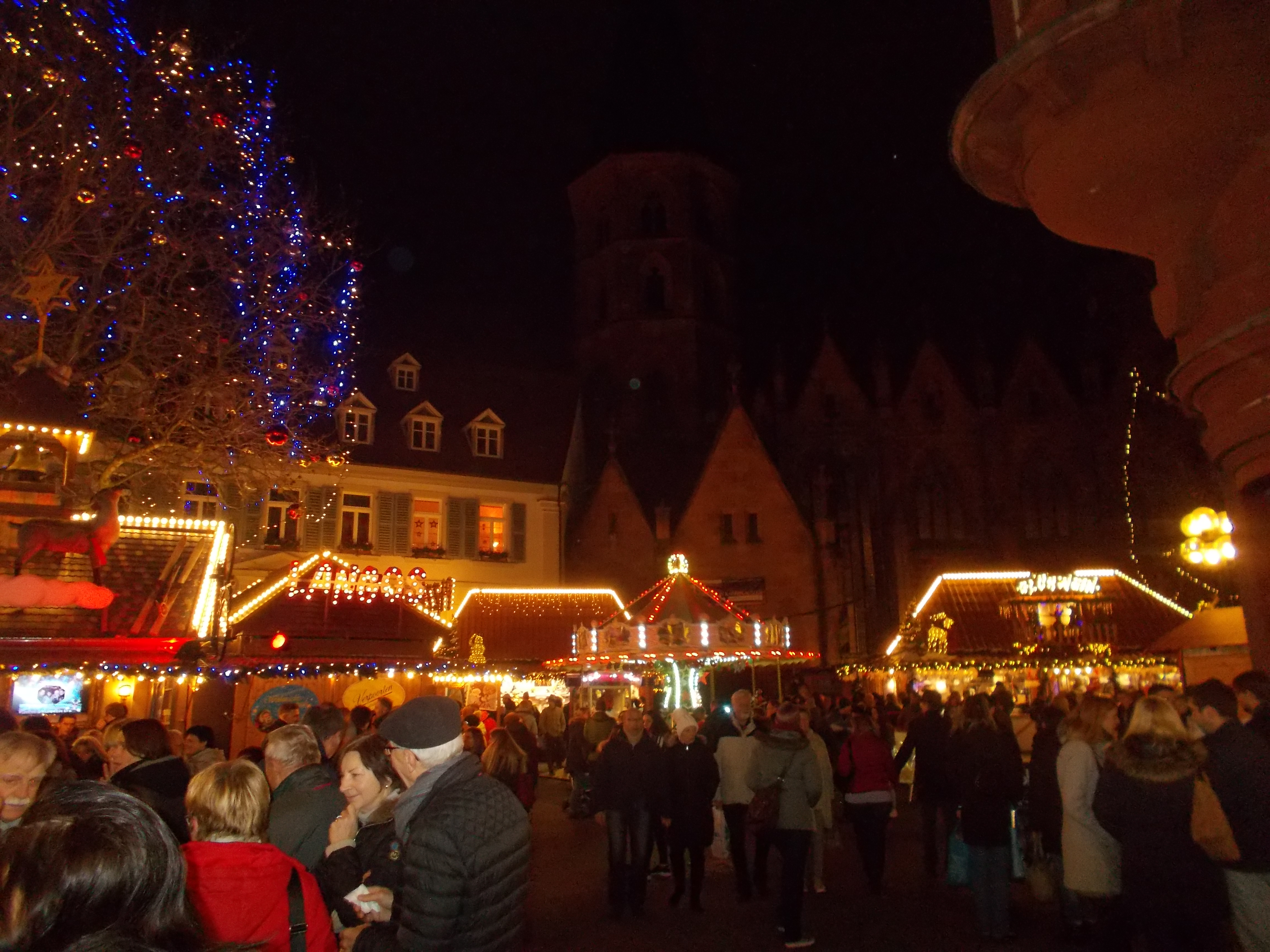 Kaiserslauterer Weihnachtsmarkt 2016 unterhalb der Stiftskirche bei Dunkelheit